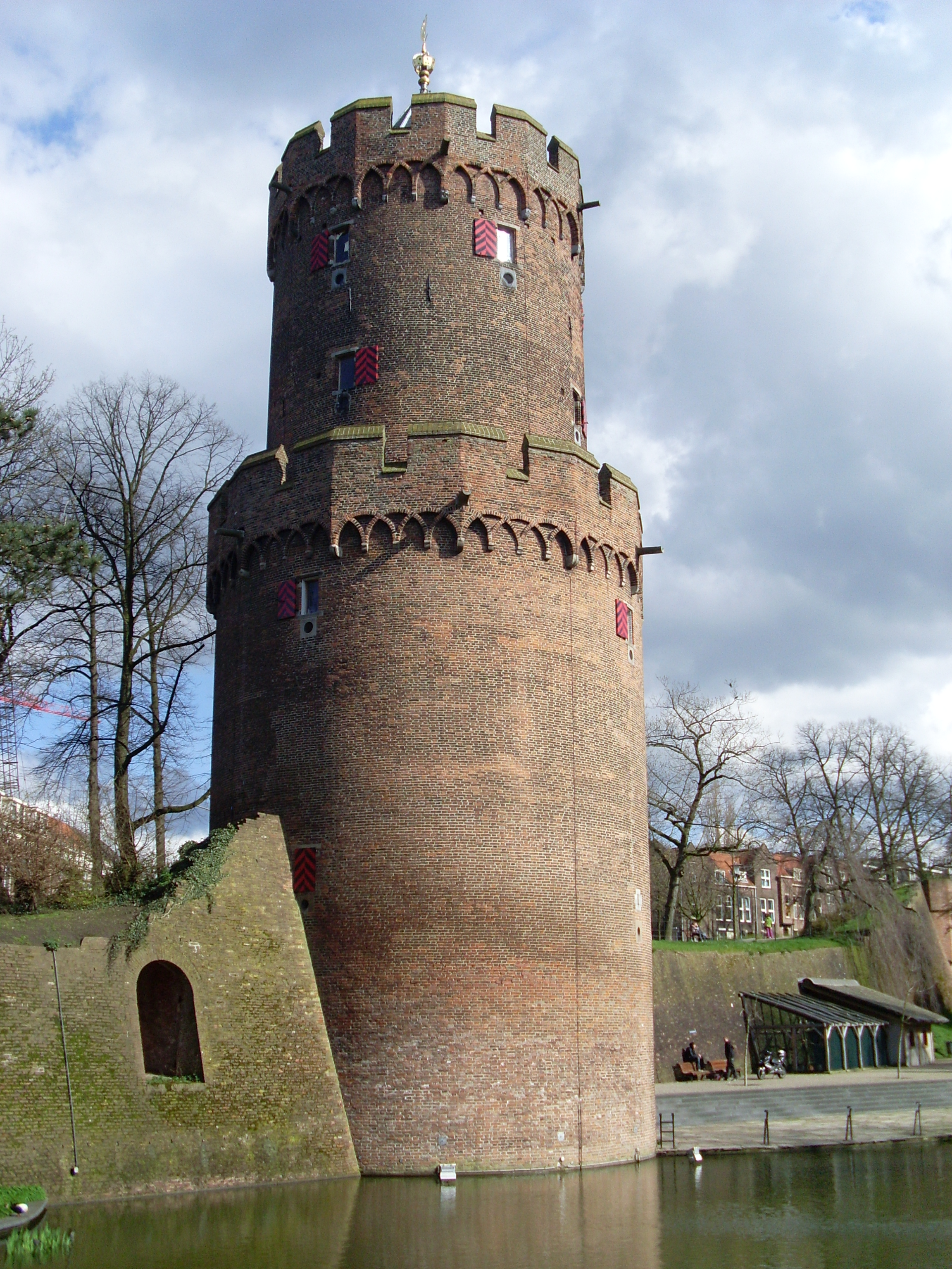 Kruittoren (gun powder tower) Nijmegen